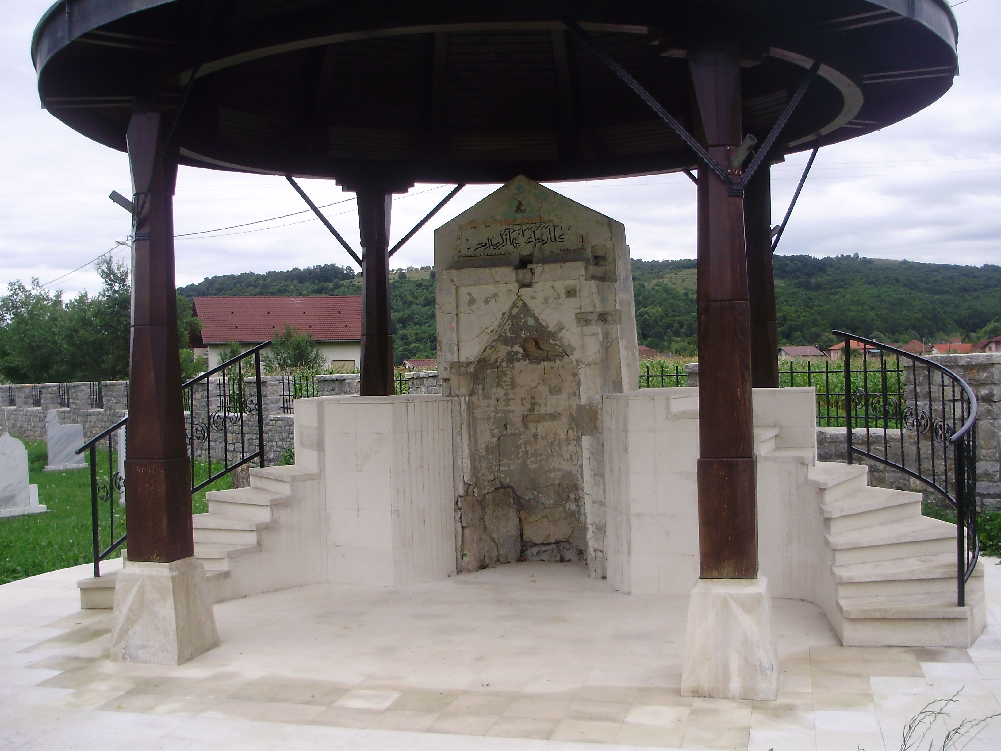 Fatihova Musalla je kulturno-historijski spomenik u Sanskom Mostu. Tu je Mehmed II klanjao prvi džuma-namaz.